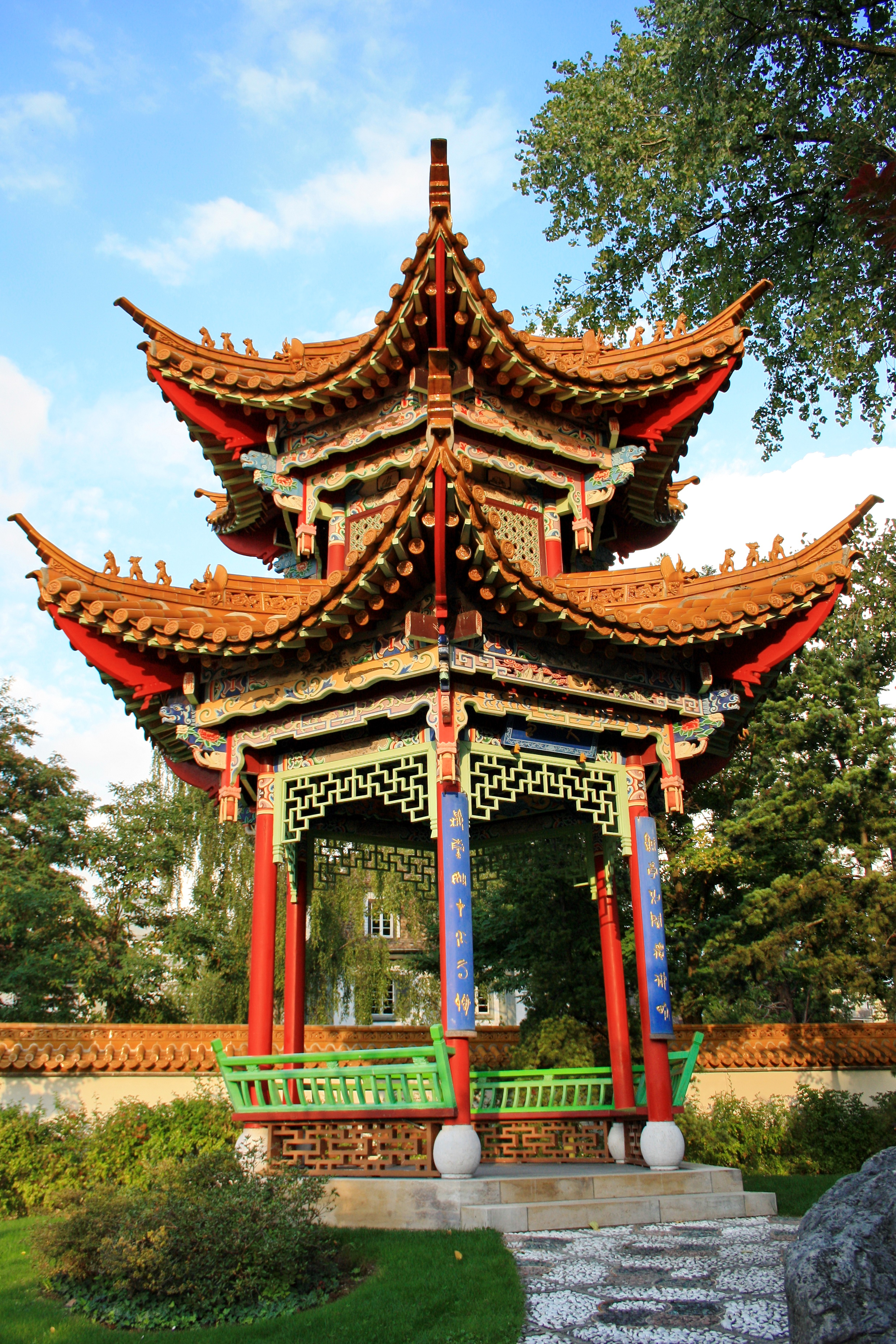 Corner pavilion in Chinagarten Zürich (Switzerland)